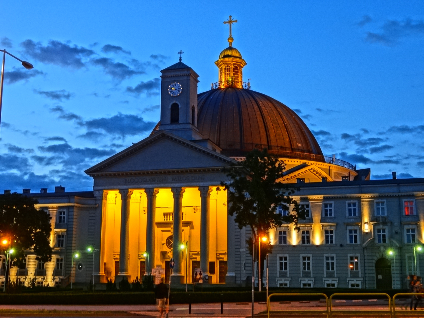 Bazylika św. Wincentego à Paulo w Bydgoszczy (budowana od 1925 r.)